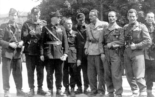 Partigiani dell'Ossola, il secondo da sinistra é Giuseppe Gisondi 3ª divisione Garibaldina classe 1923, il primo a sinistra Aldo Aniasi